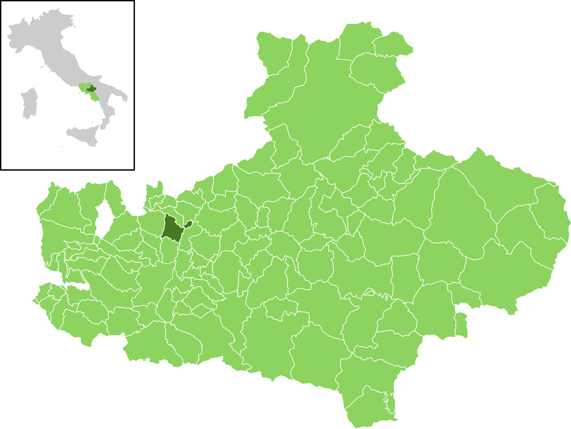 Posizione del comune all'interno della provincia di Avellino